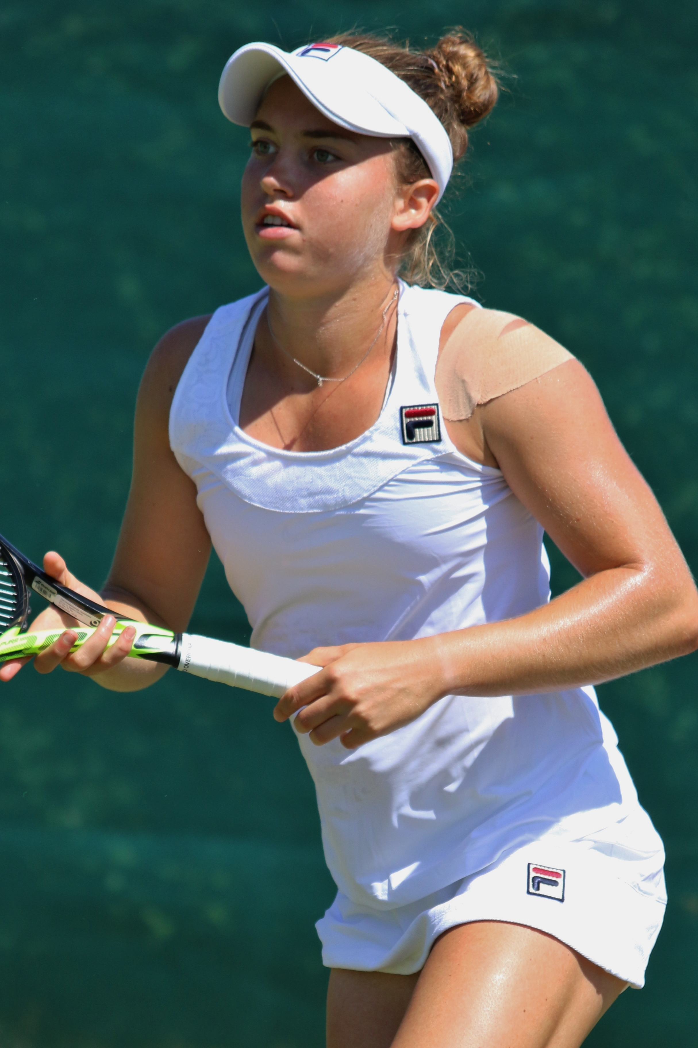 di Lorenzo WMQ18 (7)